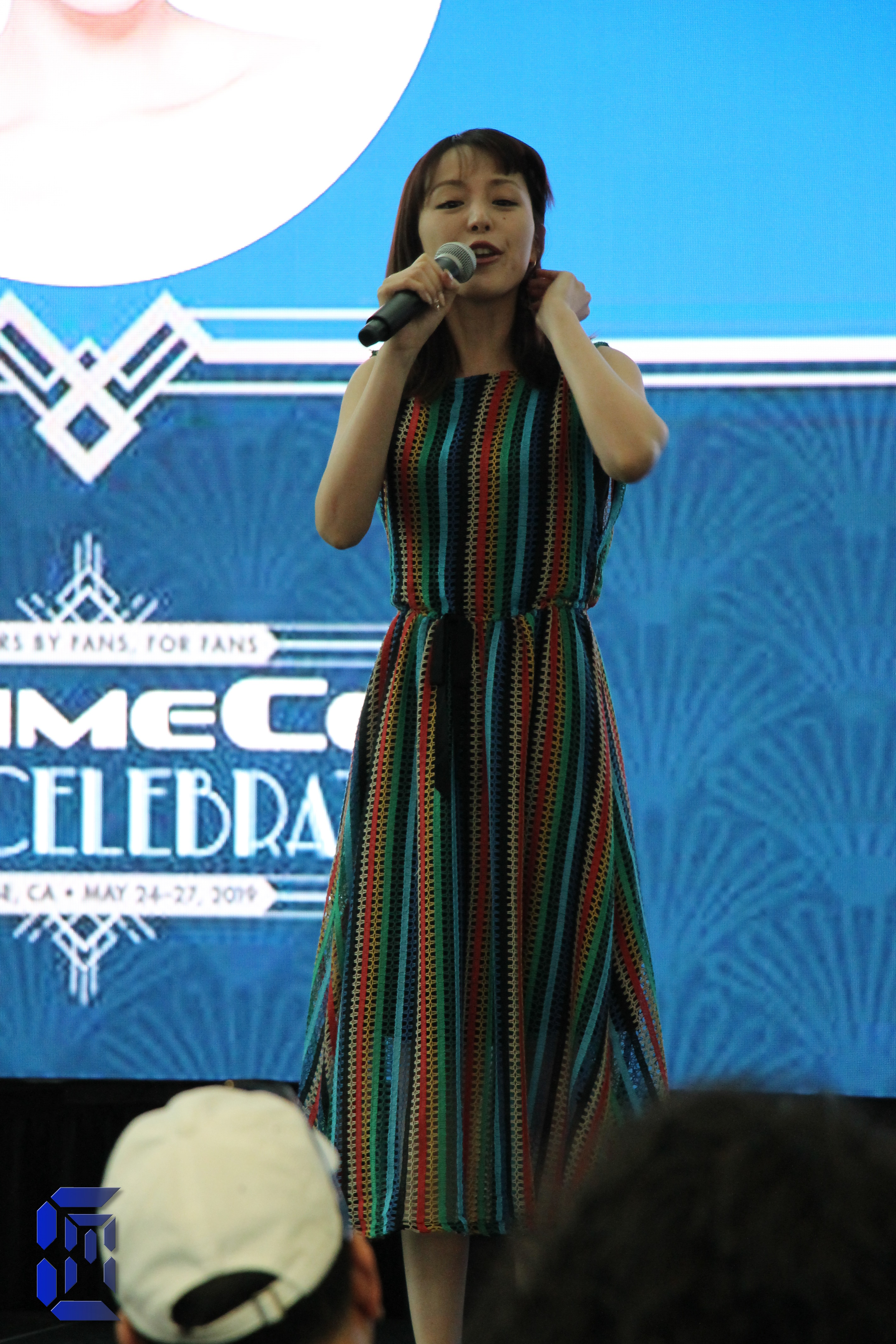 FanimeCon 2019 126